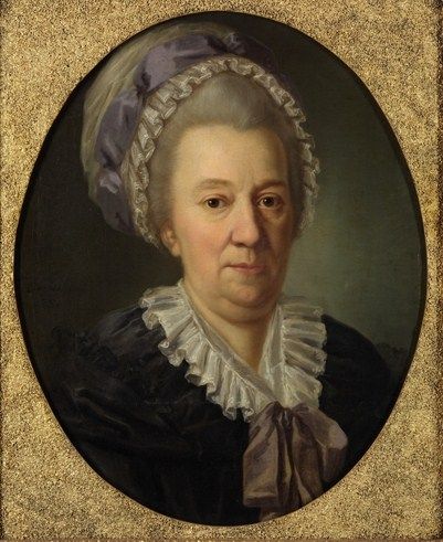 Баронесса Екатерина Ивановна Черкасова, урождённая принцесса Гедвига Елизавета Бирон (1727—1797) — гофмейстерина императрицы Елизаветы Петровны. Автор: Дарбес Иосиф Фридрих Август. Источник иллюстрации: Государственная Третьяковская галерея. Каталог собрания. Живопись XVIII–XX веков. Т. 2. Живопись XVIII века. М.: Красная площадь, 1998. - С. 118. Источник и место хранения оригинала: Государственная Третьяковская галерея, Москва. Холст, масло. 59*44,2 (овал). Время создания оригинала: 1781. Слева на фоне подпись: Darbès pinx 1781. На обороте холста надпись: Баронесса Екатерина Ивановна Черкасова, урожденная Принцесса Курлянская Биронъ. Инв- 20662.